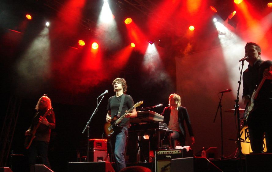 Caesars, Malmöfestivalen 2008